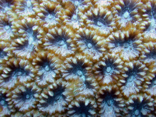 Dipsastraea matthaii, pólipos. Samoa Americana NP